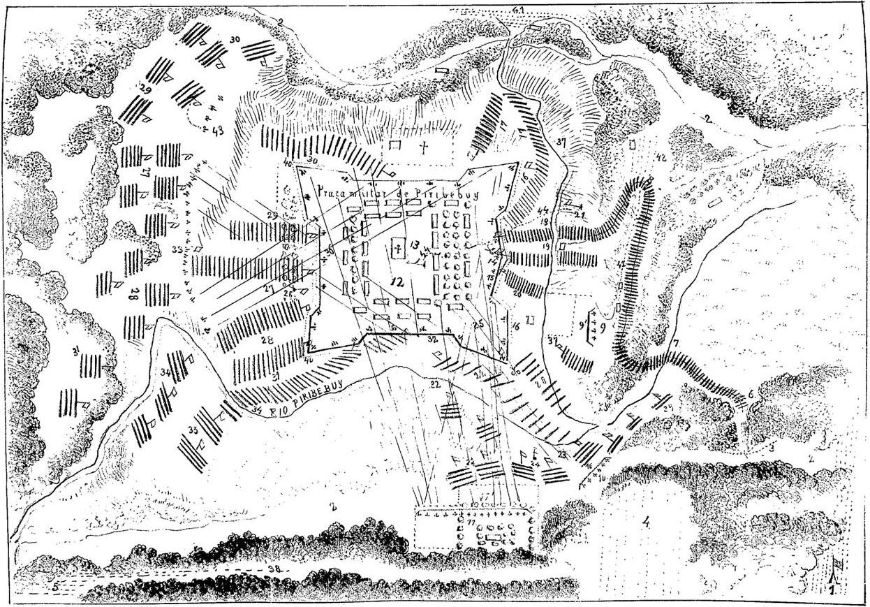 Esboço Memorial da Praça de Piribebuy. Atacada e tomada a viva força a 12 de agosto de 1869. Desenhado pelo Coronel Conrado Maria da Silva Bitancourt e obisequosamente offerecido pelo Marechal de Exército ConselheiroJosé Maria da Silva Bitancourt.